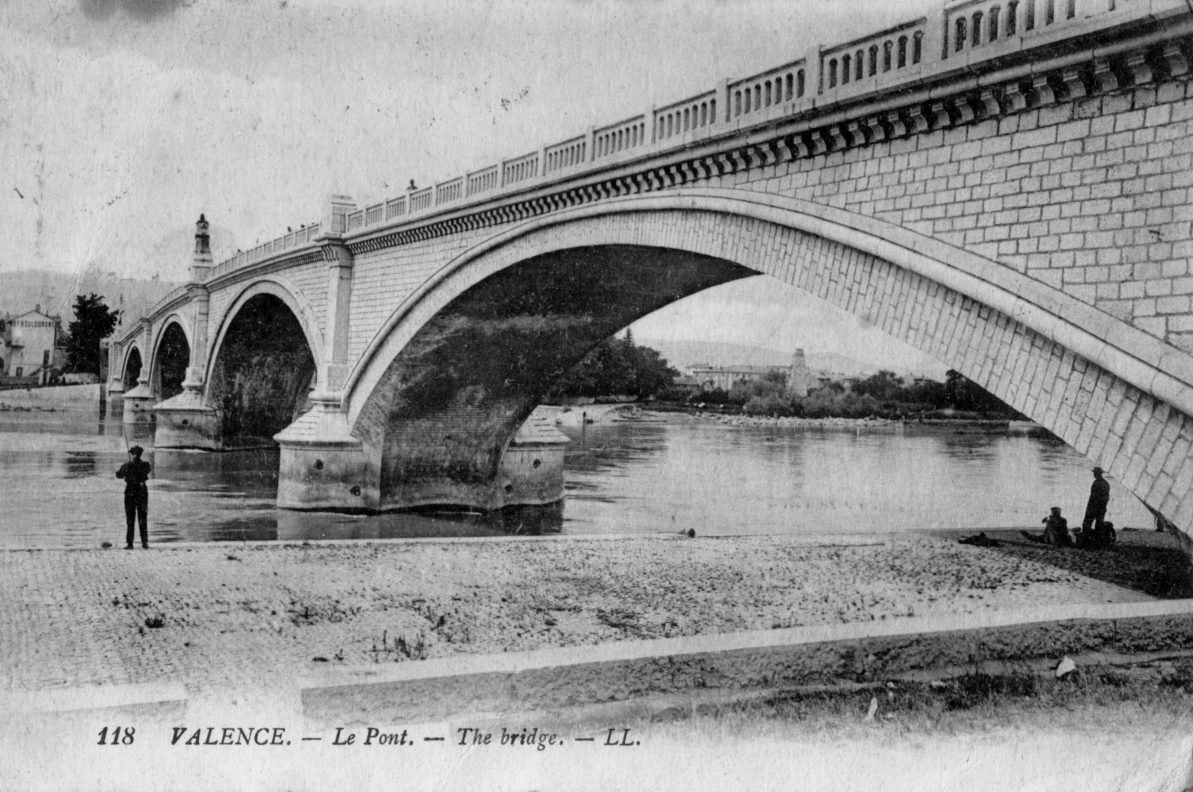 Valence. Le pont. Carte postale ancienne (vers 1919). éditeurs : Léon et Lévy (LL)